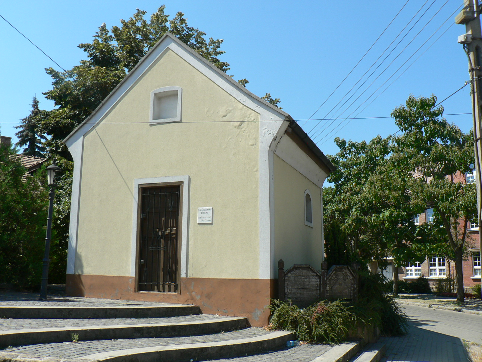 A pilisvörösvári Maria-hilf kápolna. ID 7244. Barokk, 1773. Belsőben fogadalmi oltár, Mária gyermekkel oltárkép, rokokó.